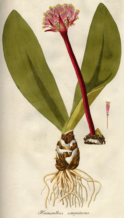 Haemanthus sanguineus Jacq.